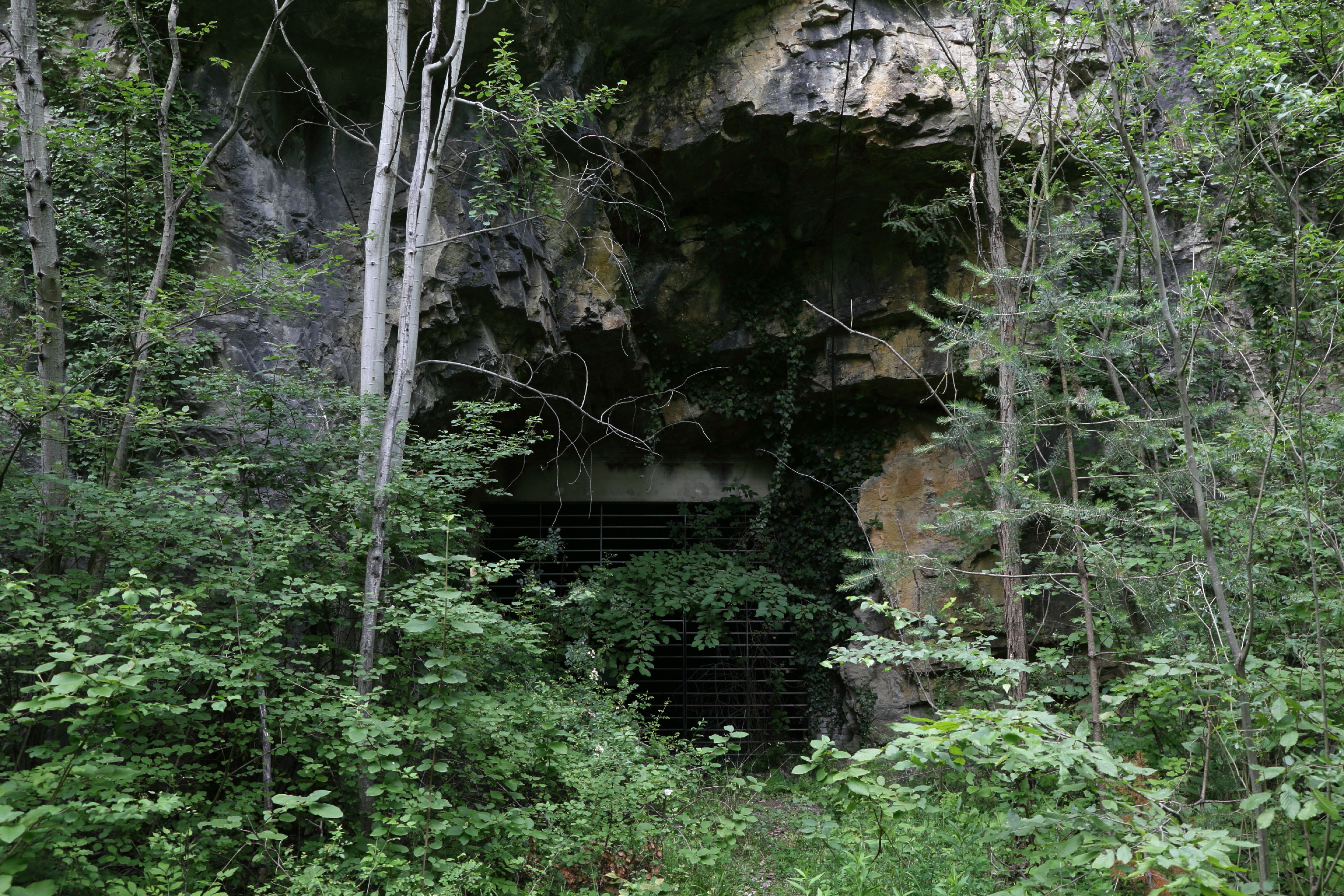 Stollen IX in der Peggauer Wand This media shows the nature reserve in Styria with the ID NSG 59 c.